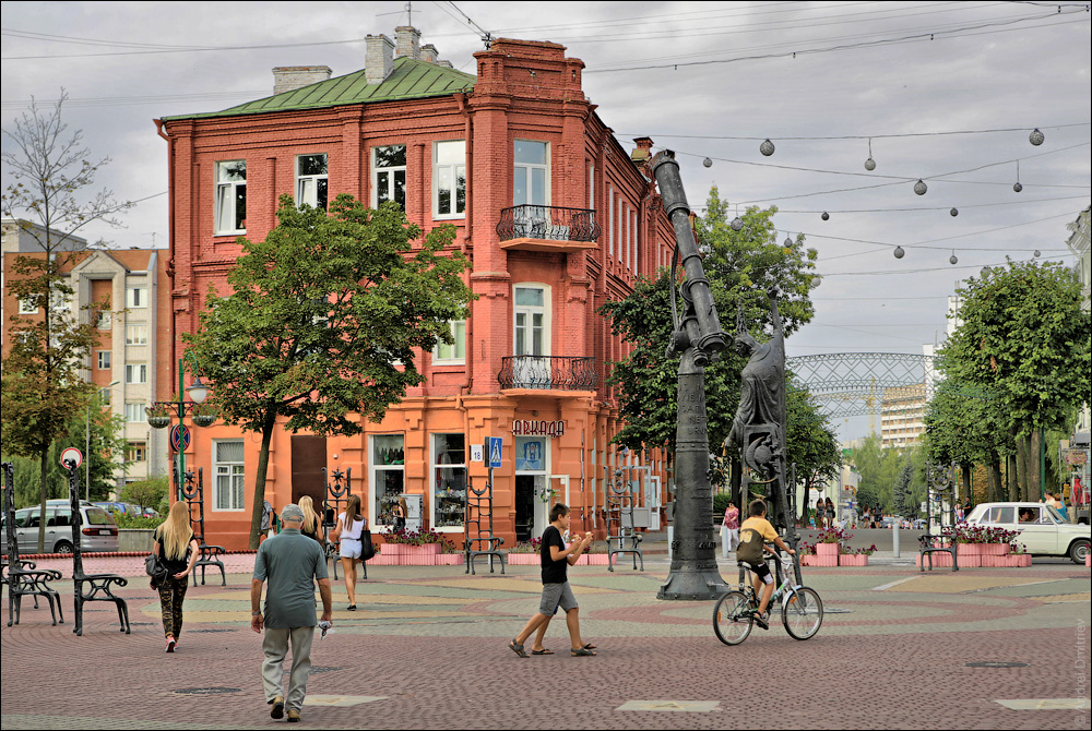 Магілёўскія відарысы